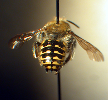 Anthidium palliventre female